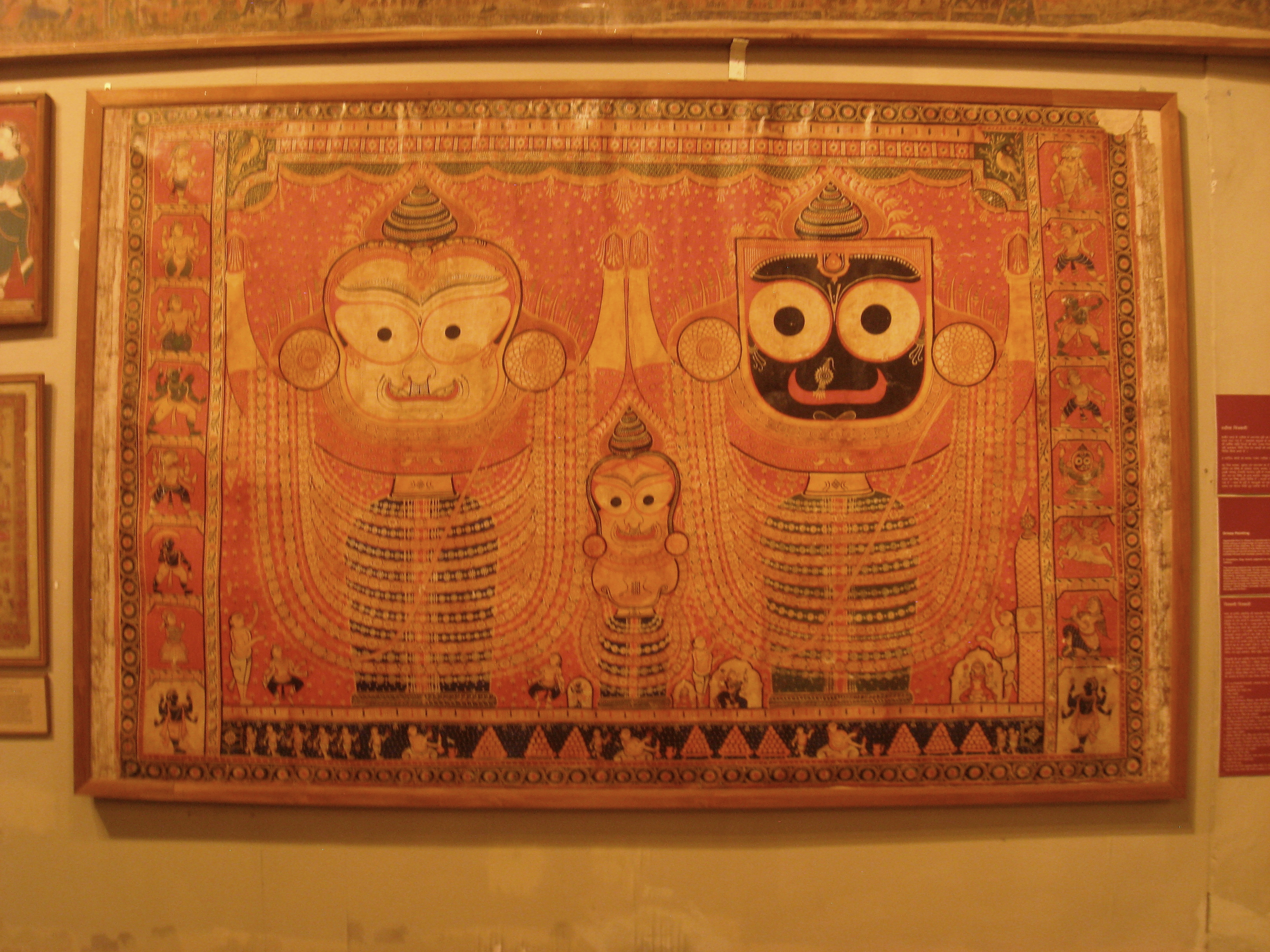 Exhibit in Crafts Museum, New Delhi, India.